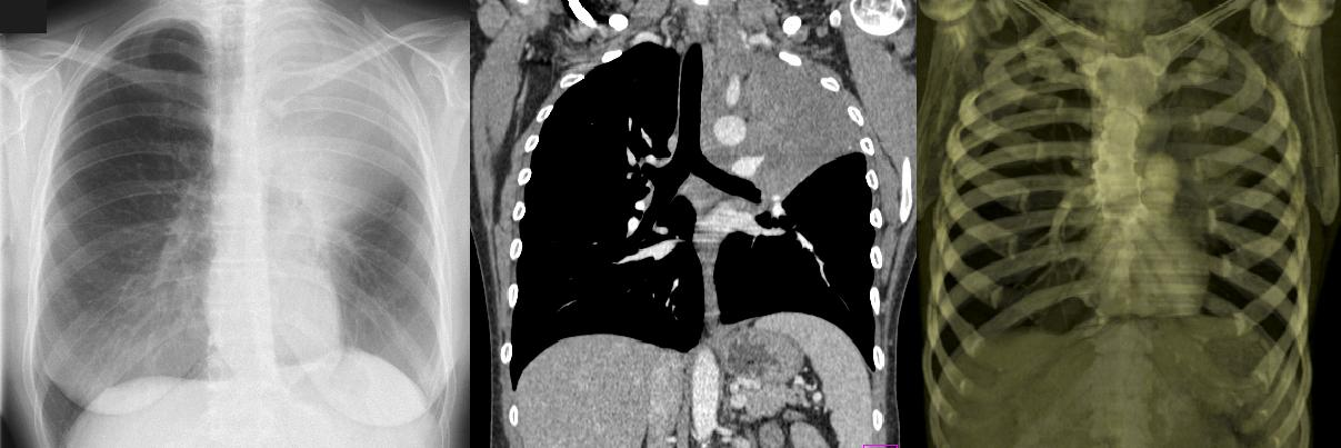 Lungenkrebs links. Von links nach rechts Röntgenbild, CT-Schicht, Digitales Radiogramm